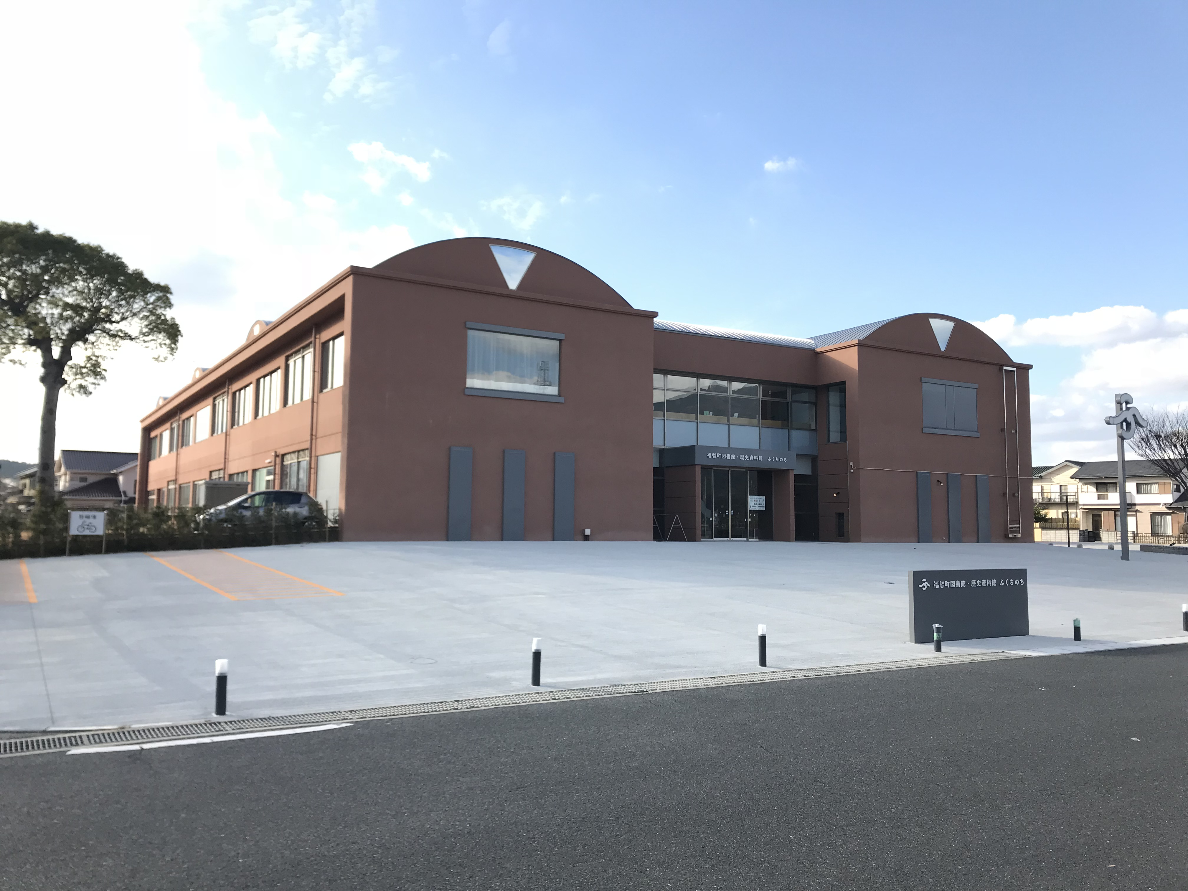 福智町図書館・歴史資料館「ふくちのち」